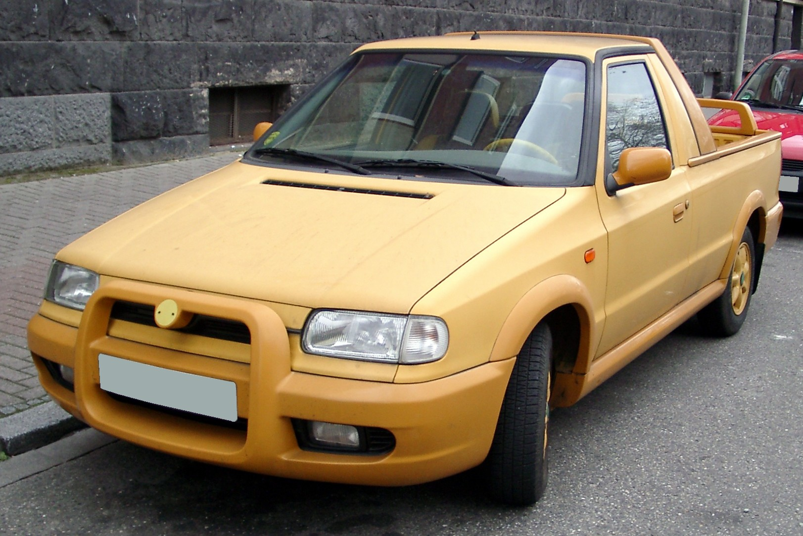 Škoda Felicia Pickup